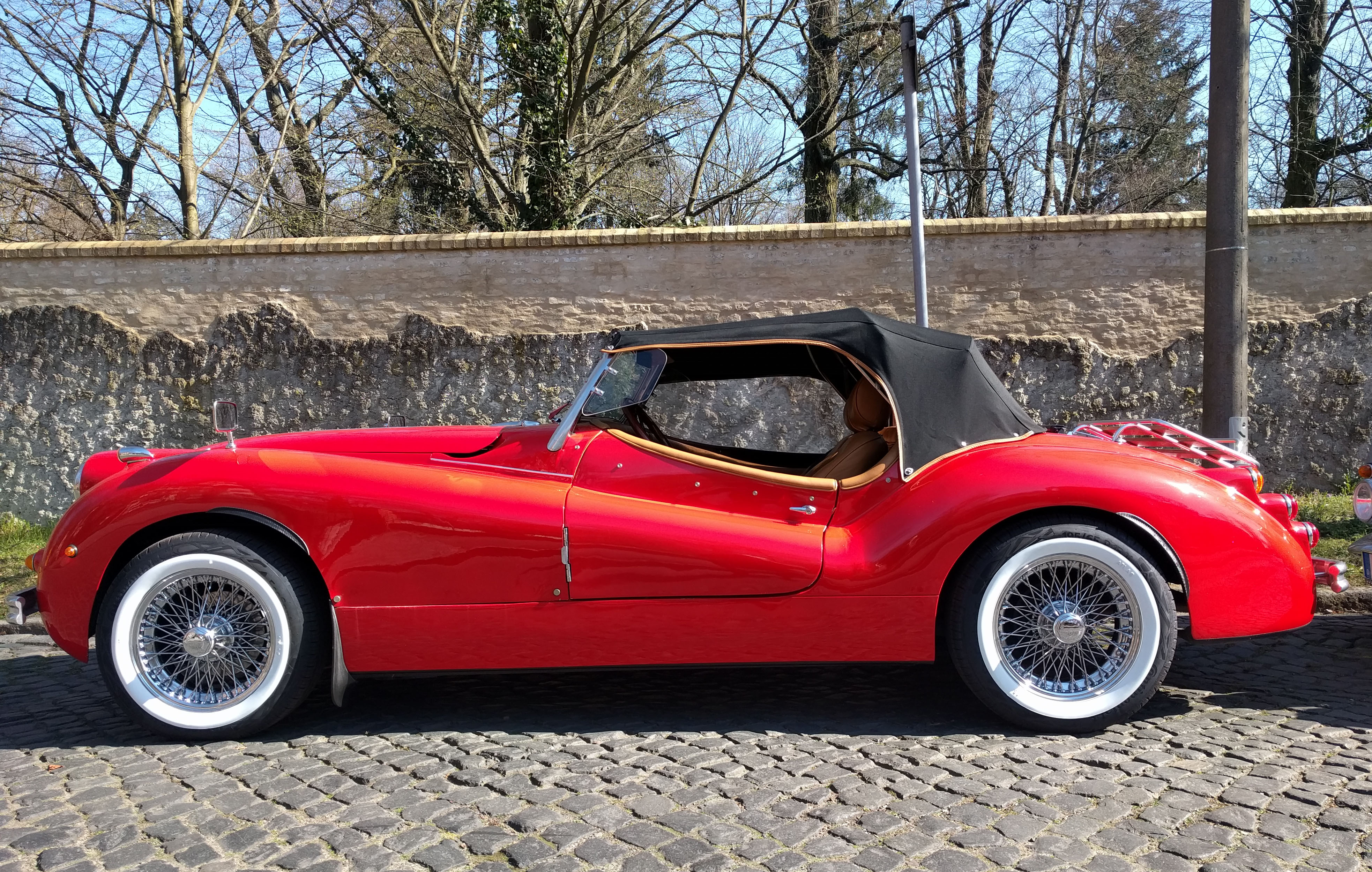 Albaycin mit Speichenrädern BRD zugelassen